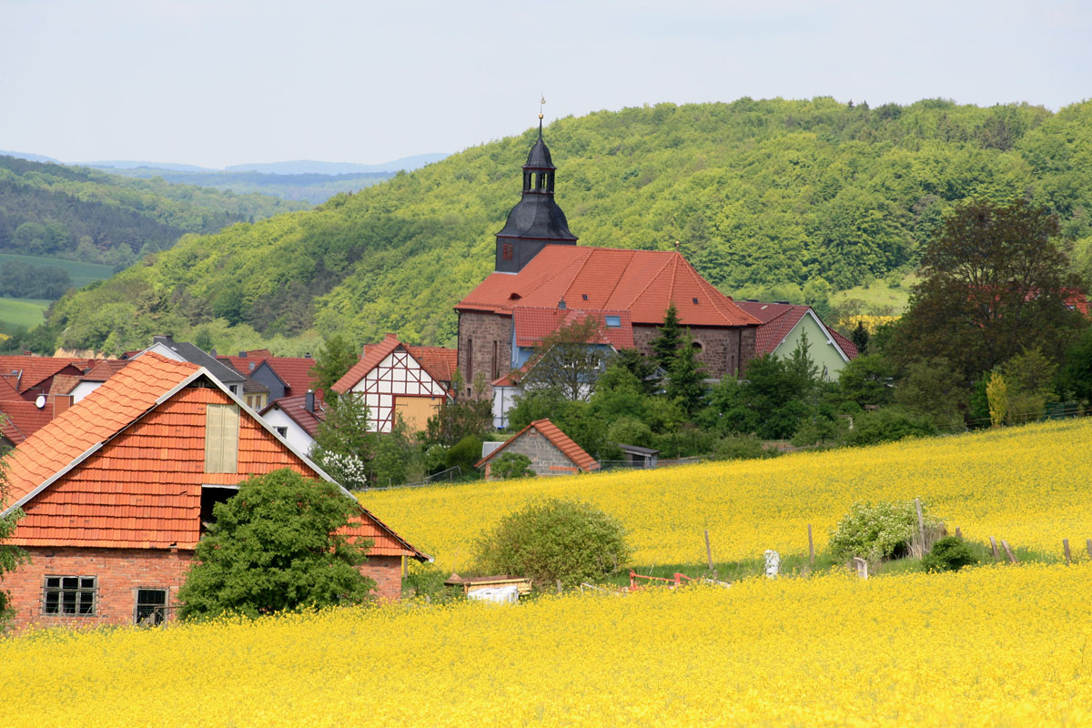 Village church St. John the Baptist in Gerbershausen (Eichsfeld)